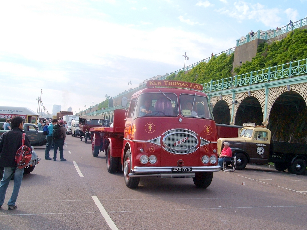 1959 ERF type 6.4G reg 430 DYD